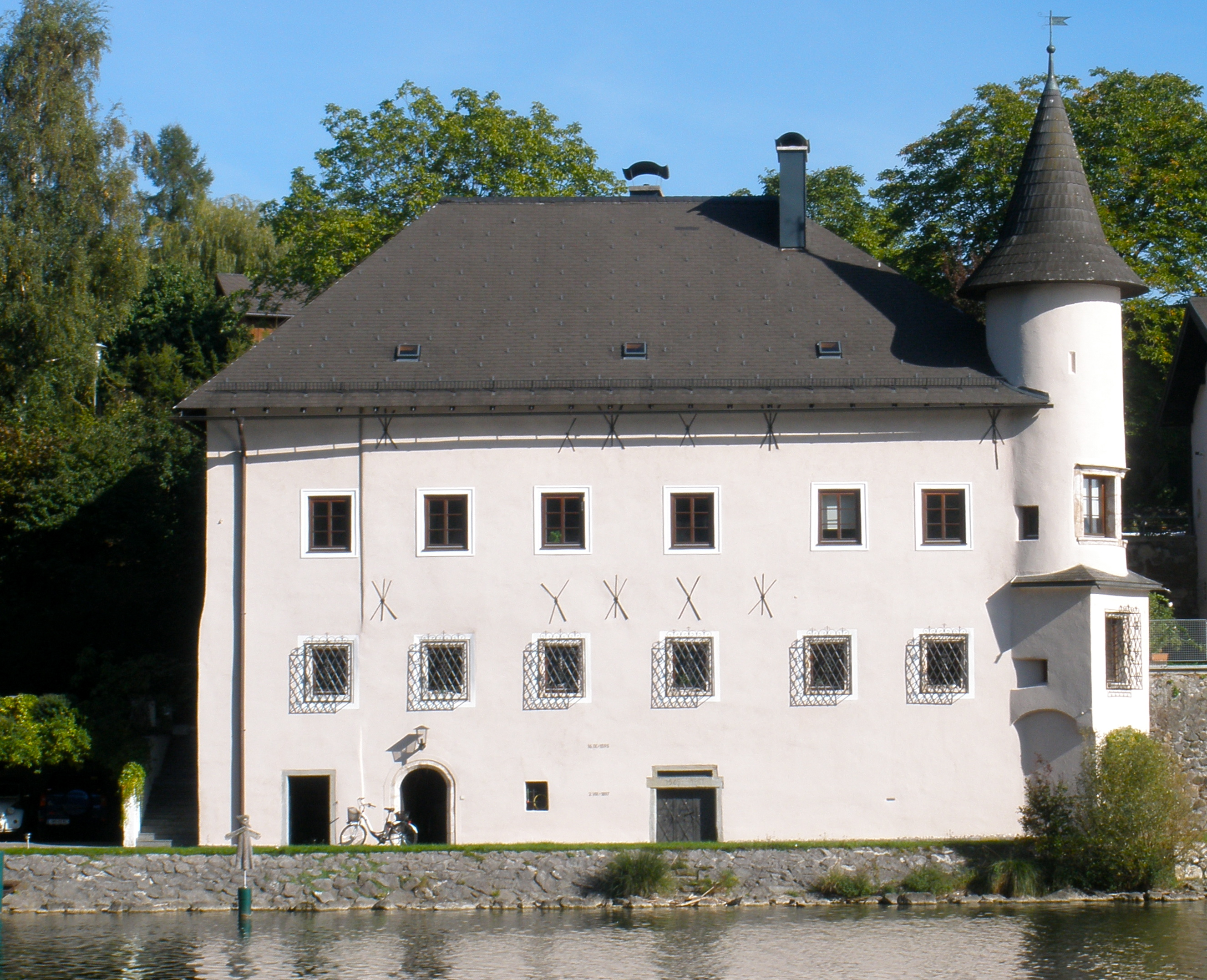 Der ehemalige Freisitz Mühlleiten, auch "Kurzmühle" genannt", ist in Privatbesitz und wird als Wohngebäude genutzt.